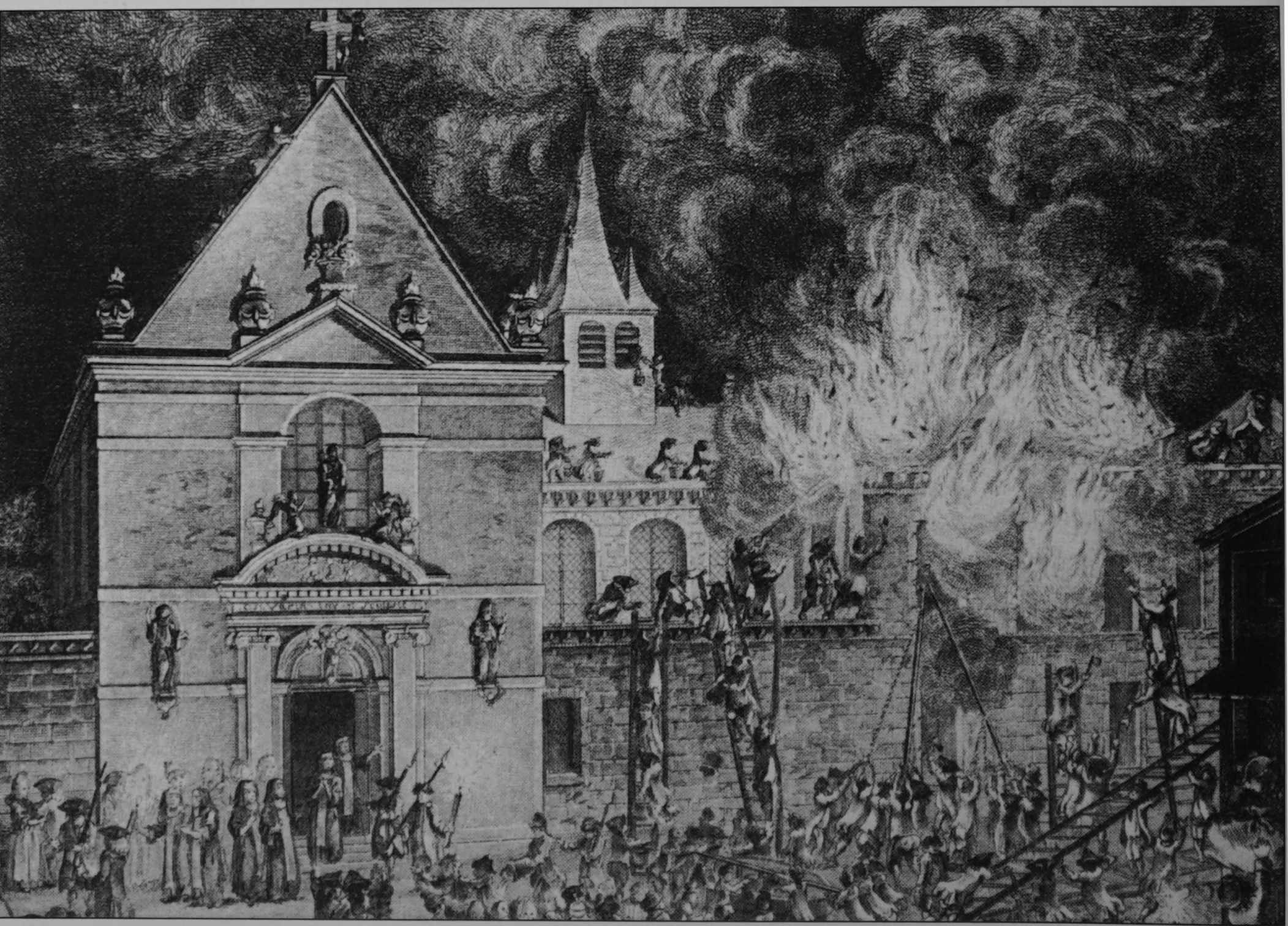 25_sept_1769, incendie du prieuré_Joseph.